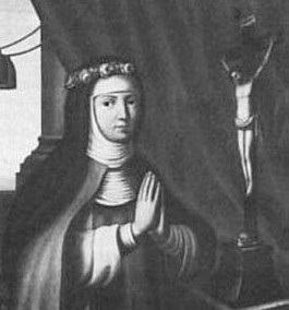 Elisabeth von Rantzau (1624-1706) als Annuntiatin